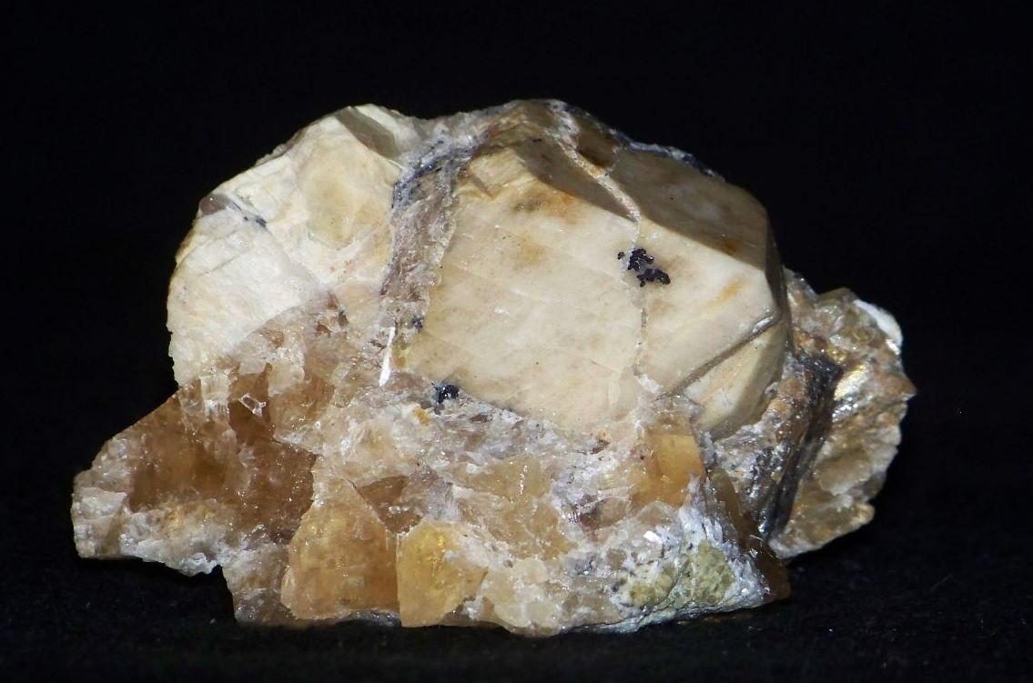 Mineralizacja pegmatytowa. Na zdjęciu widoczny kryształ ortoklazu, oraz kalcyt, klinochlor, fluoryt, zoisyt. kamieniołom Zimnik, okolice Jeleniej Góry, Dolny Sląsk.